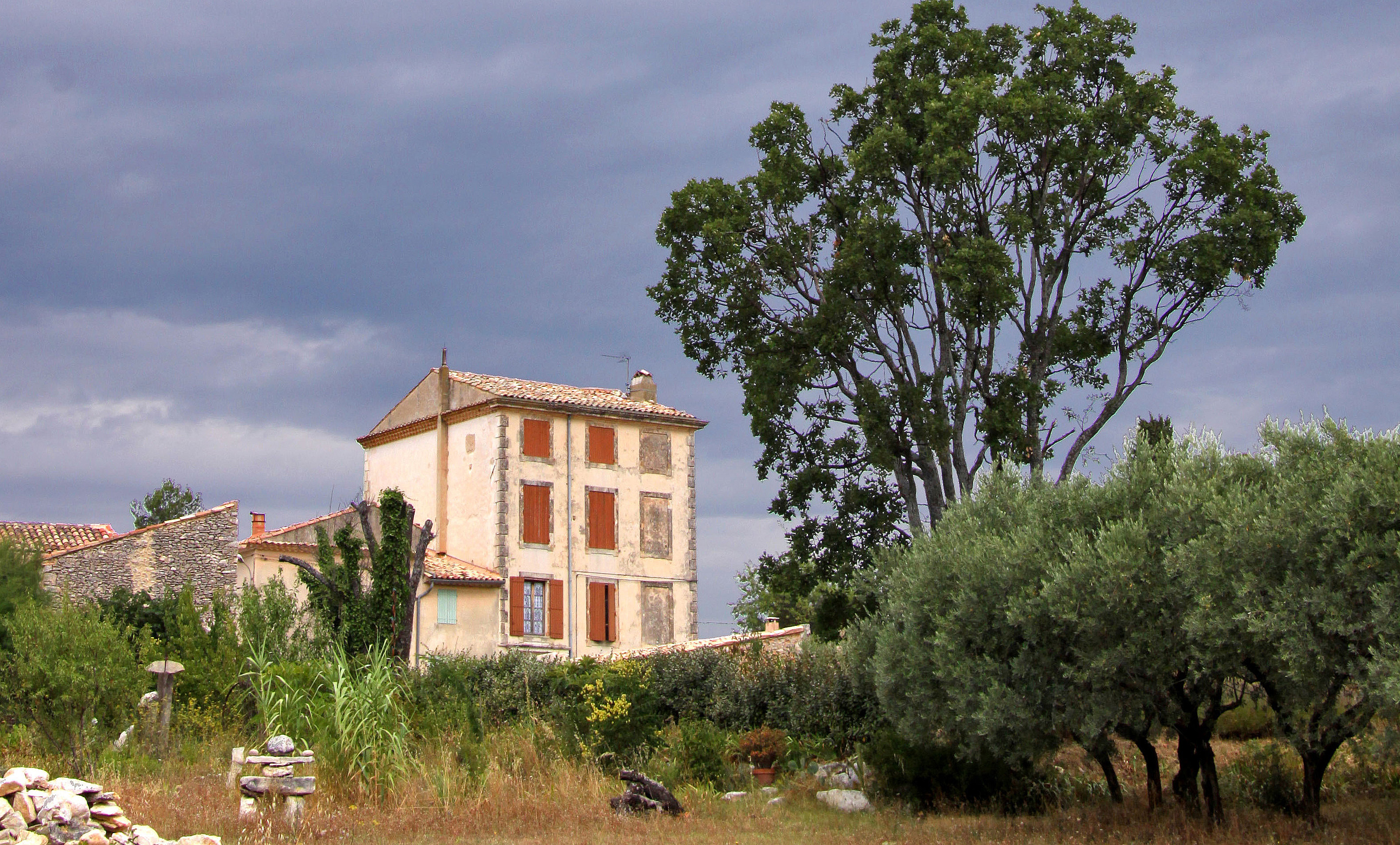 Grand bastide à Villars